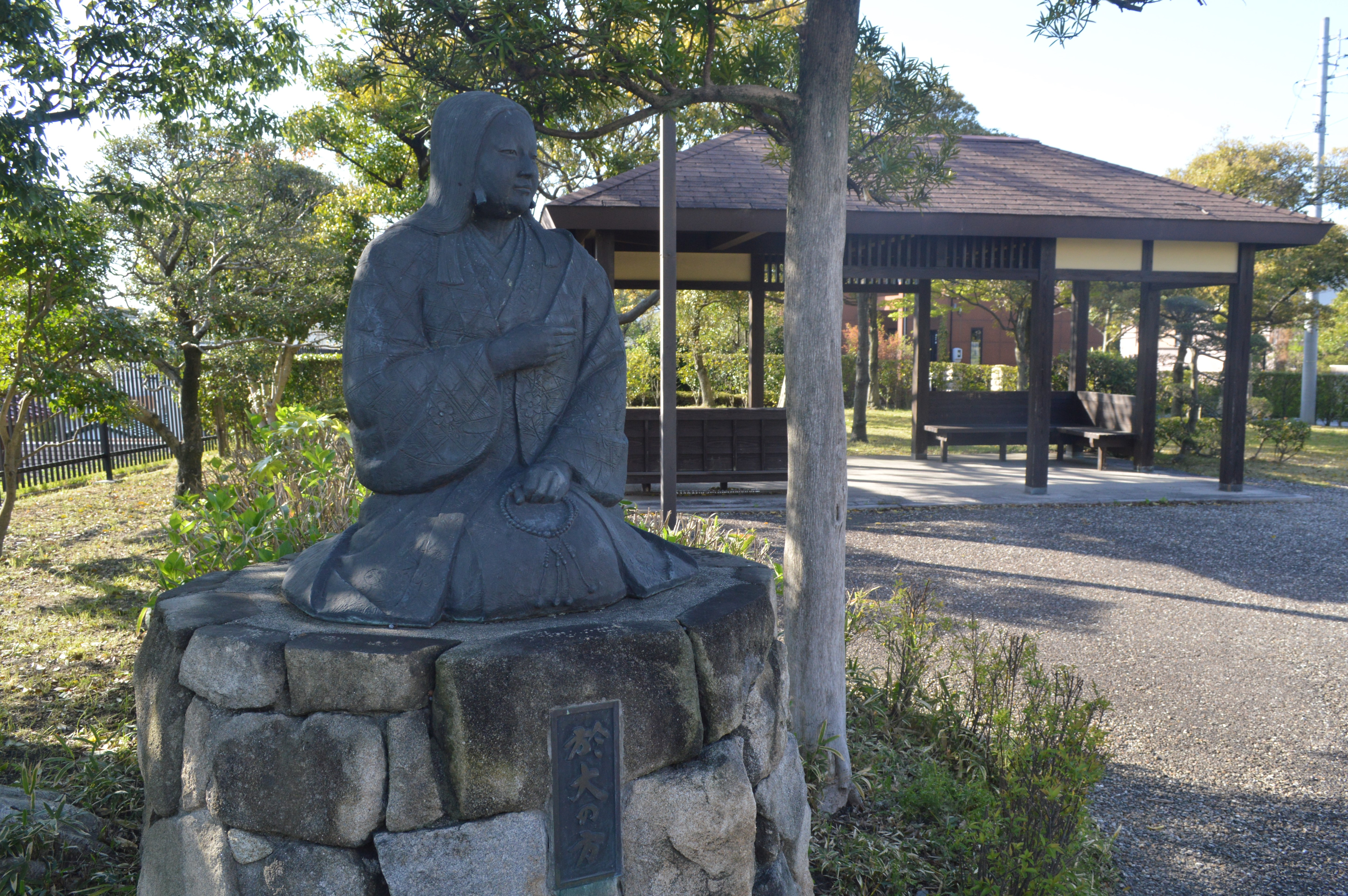 愛知県刈谷市銀座6丁目58-1にある椎の木屋敷跡。